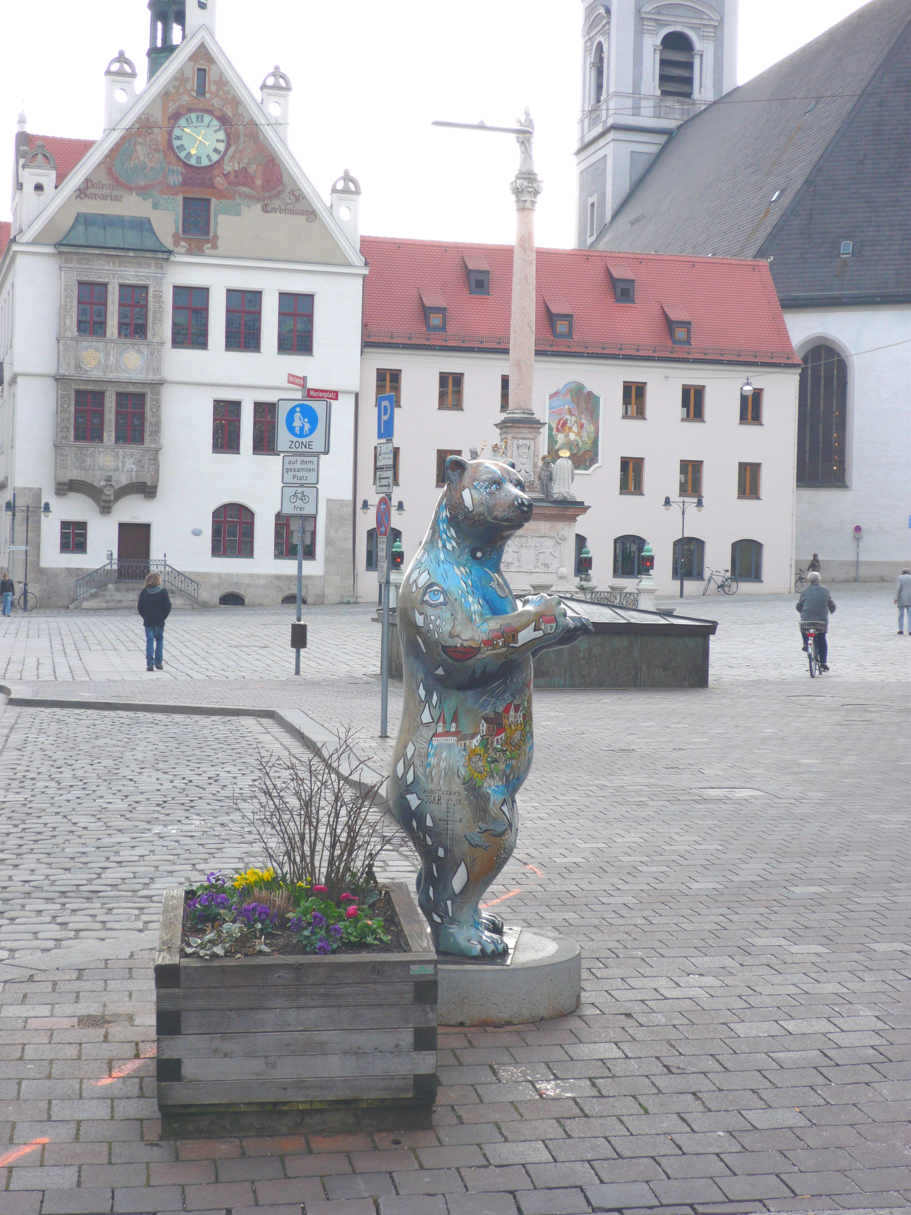 Bear's statue in Freising